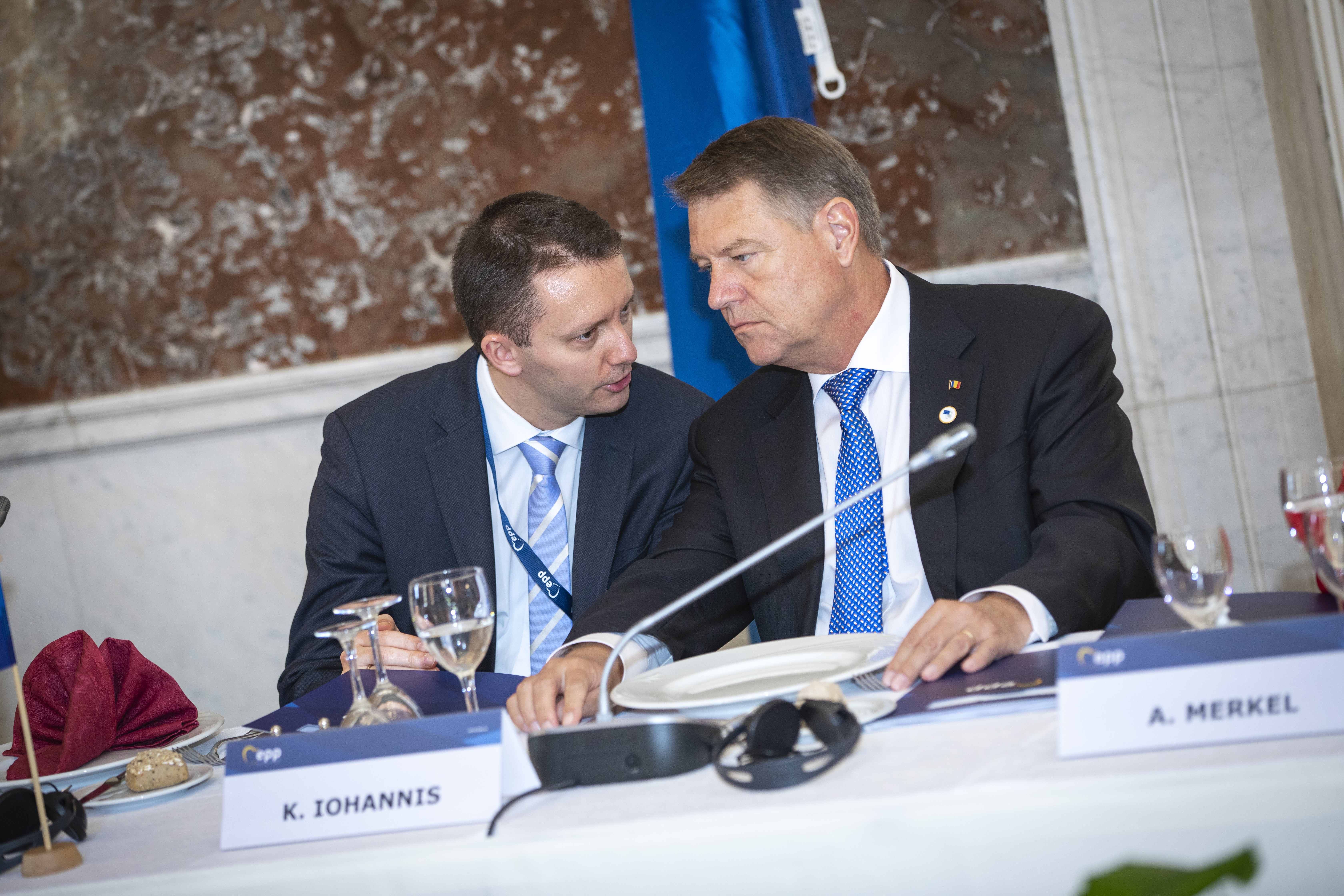 EPP Summit Brussels, March 2019